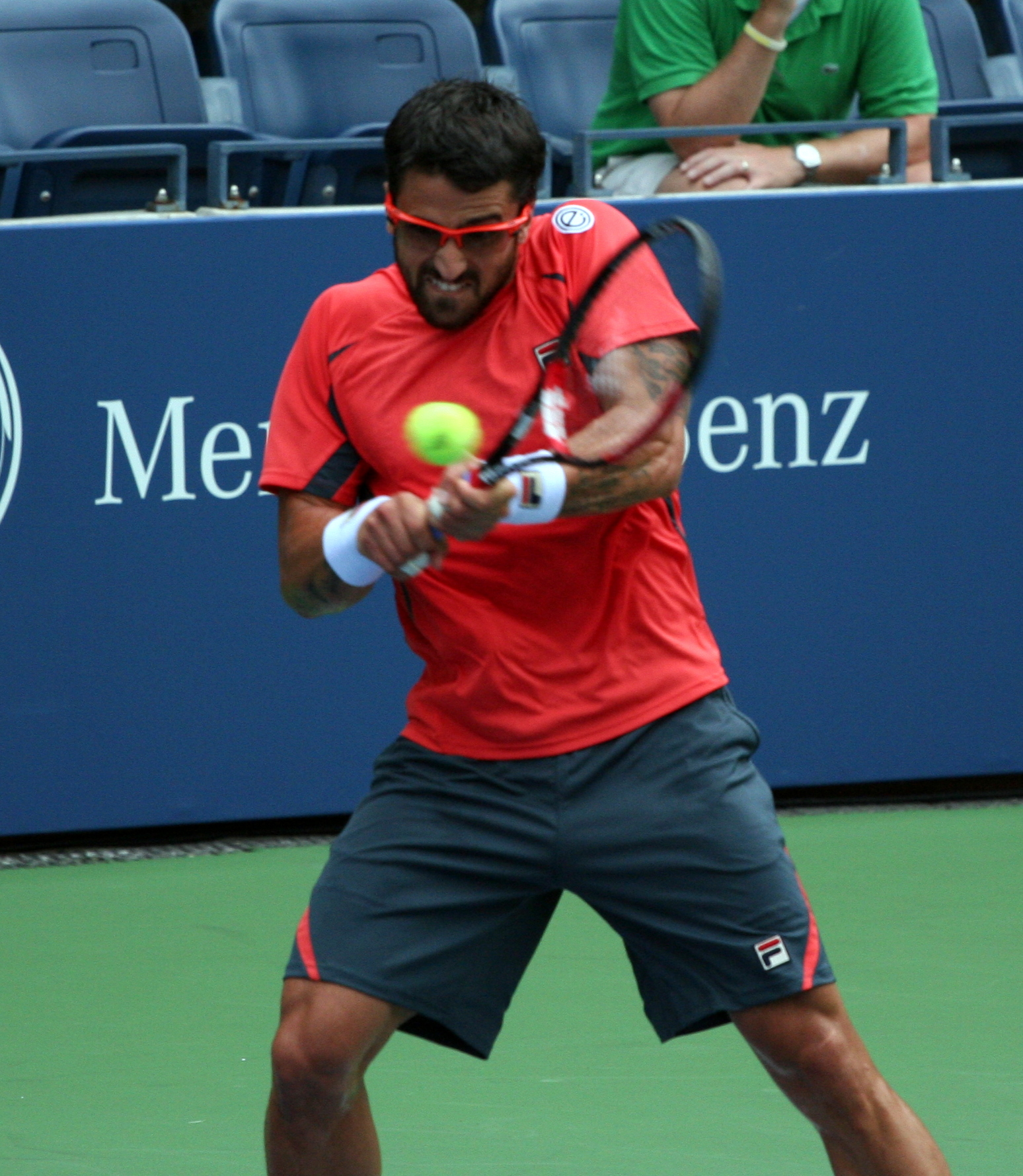 Janko Tipsarević at 2012 US Open Wednesday, Sept. 5, 2012